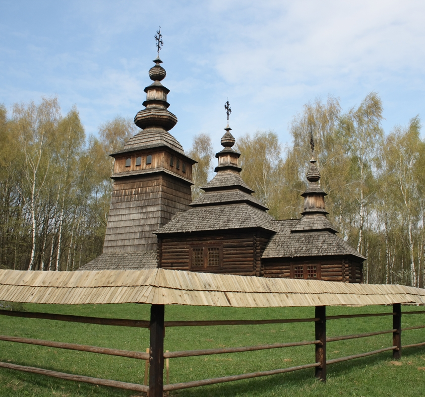 Старинная церковь в скансене «Шевченковский гай» во Львове